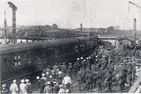 Appontement du train à Pauillac